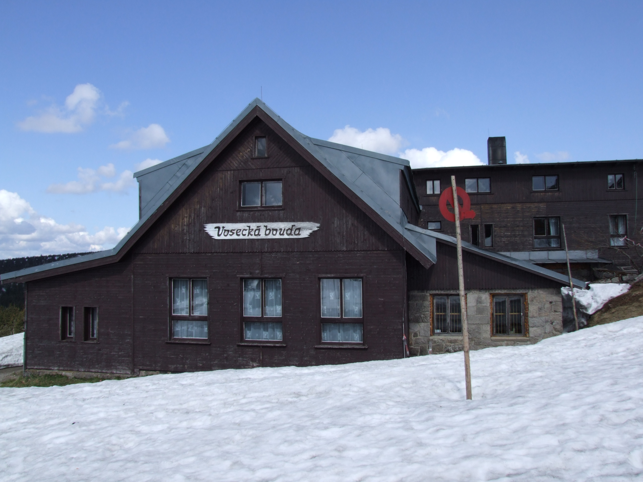 Vosecká bouda (Wossecker Baude) - hostel in Krkonoše, Sudetes